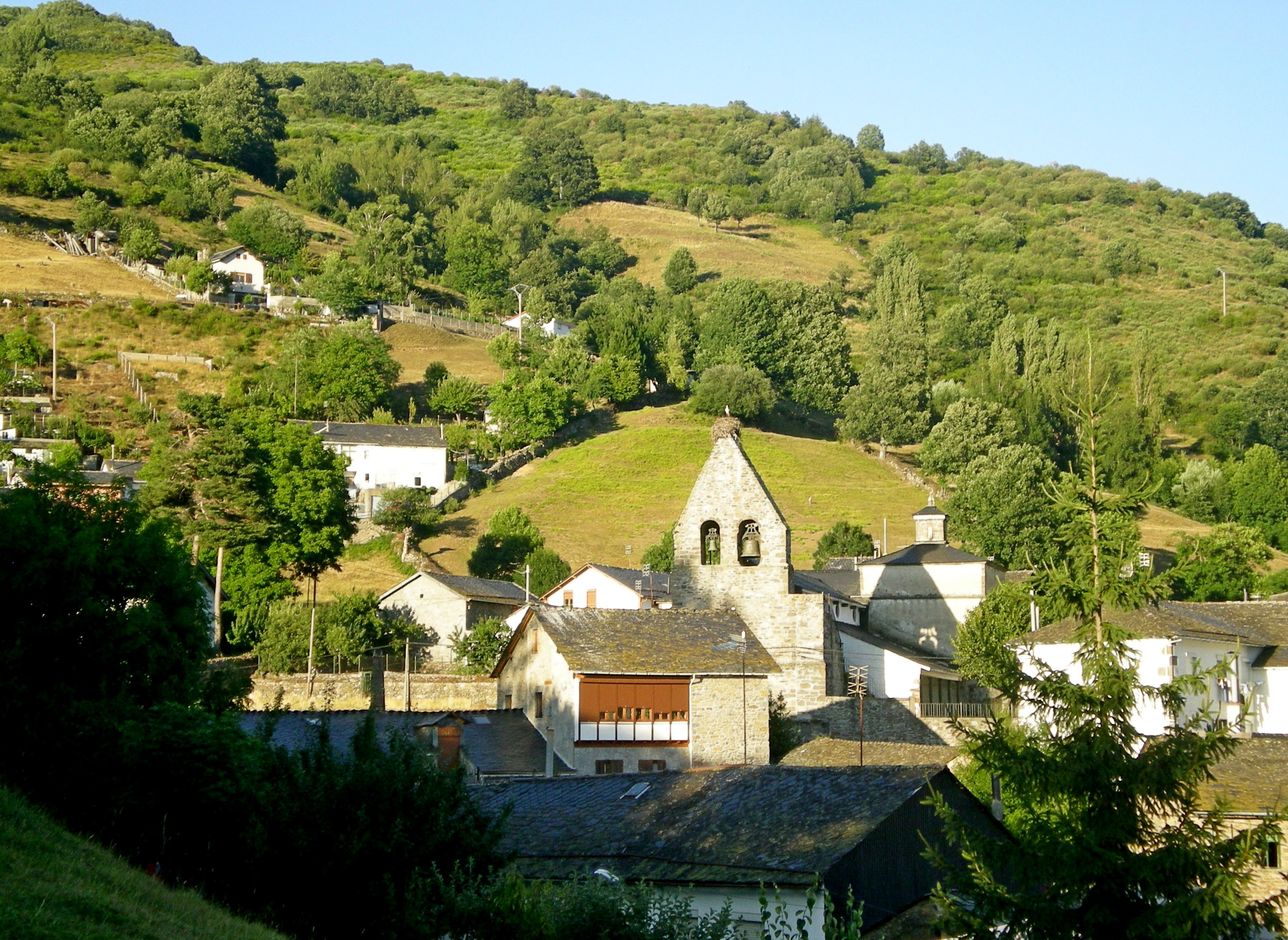 San Miguel de Laciana, Villablino (León, España).